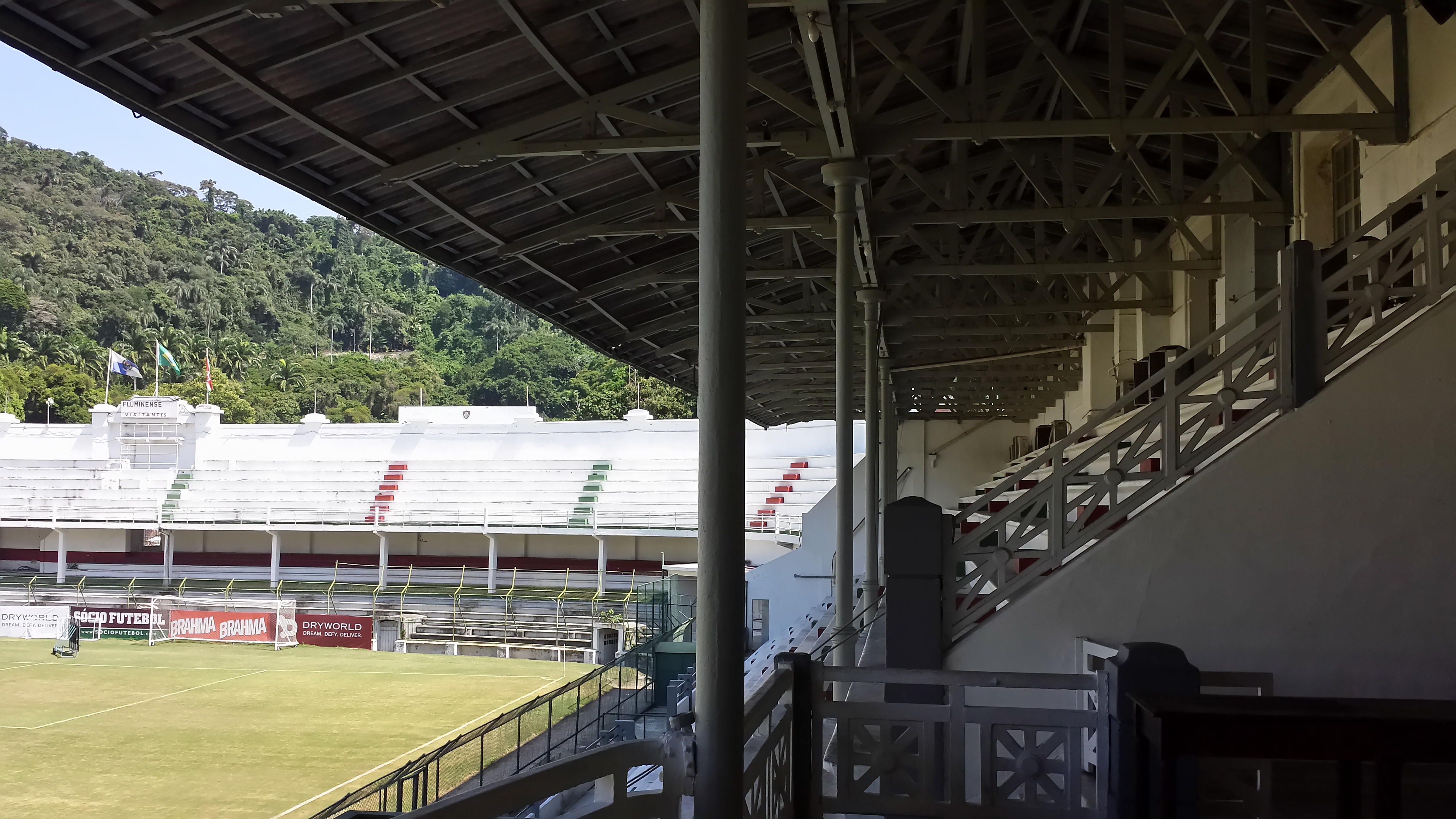 Estádio de Laranjeiras em 10 de abril de 2016.